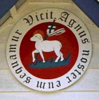 Signet der Brüdergemeine an der Kirche der Brüdergemeine in Neu-Amsterdam: Vicit Agnus noster, eum sequamur - "Unser Lamm hat gesiegt - ihm lasst uns folgen".